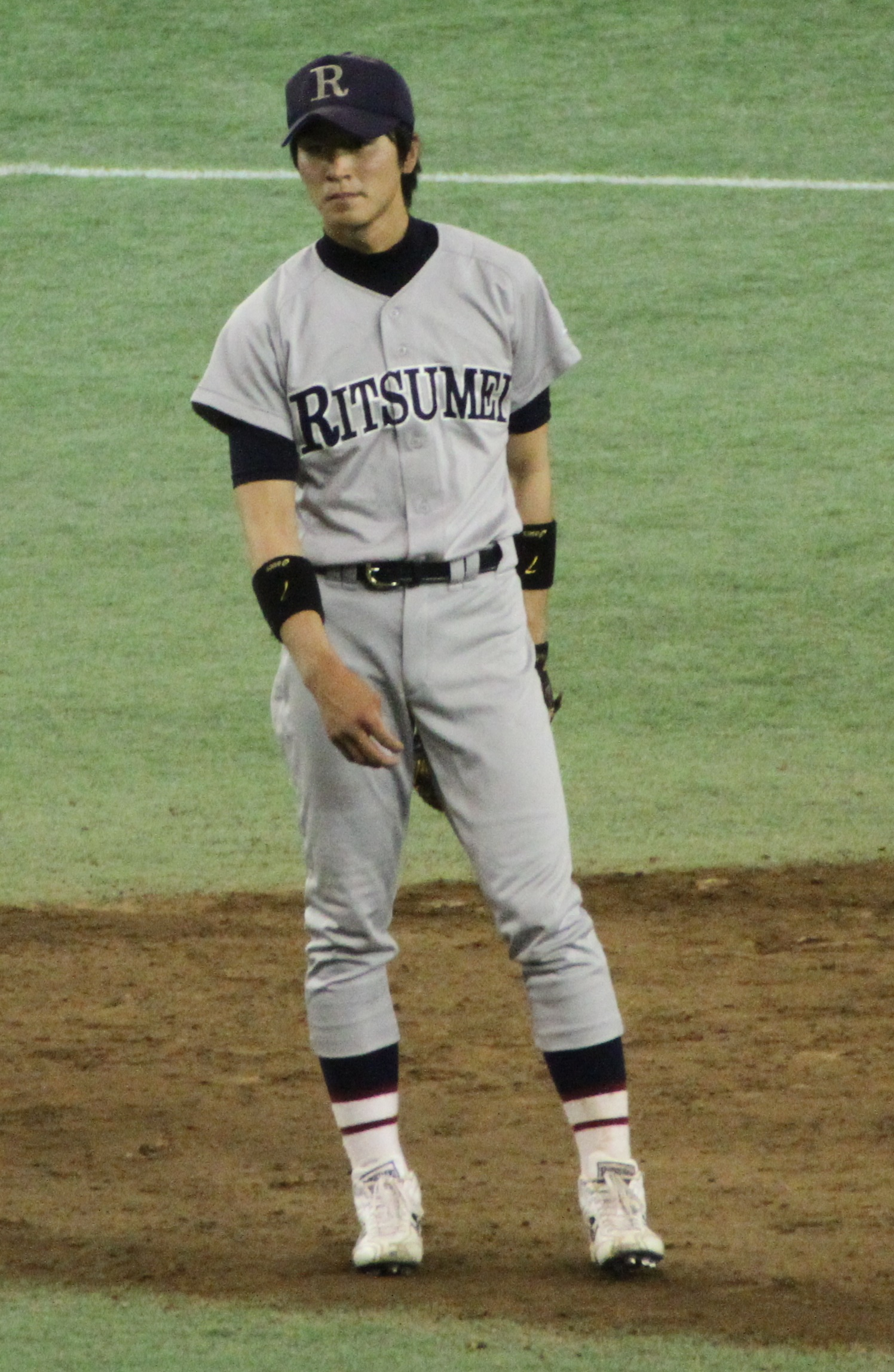 立命館大学硬式野球部の金子侑司内野手。第61回（2012年） 全日本大学野球選手権大会2回戦、対龍谷大学戦。東京ドームにて。